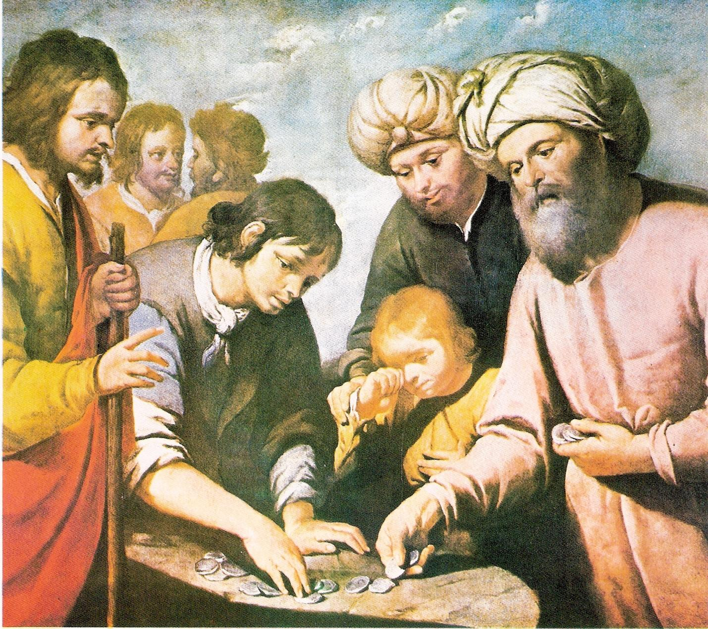 Giuseppe venduto ai fratelli